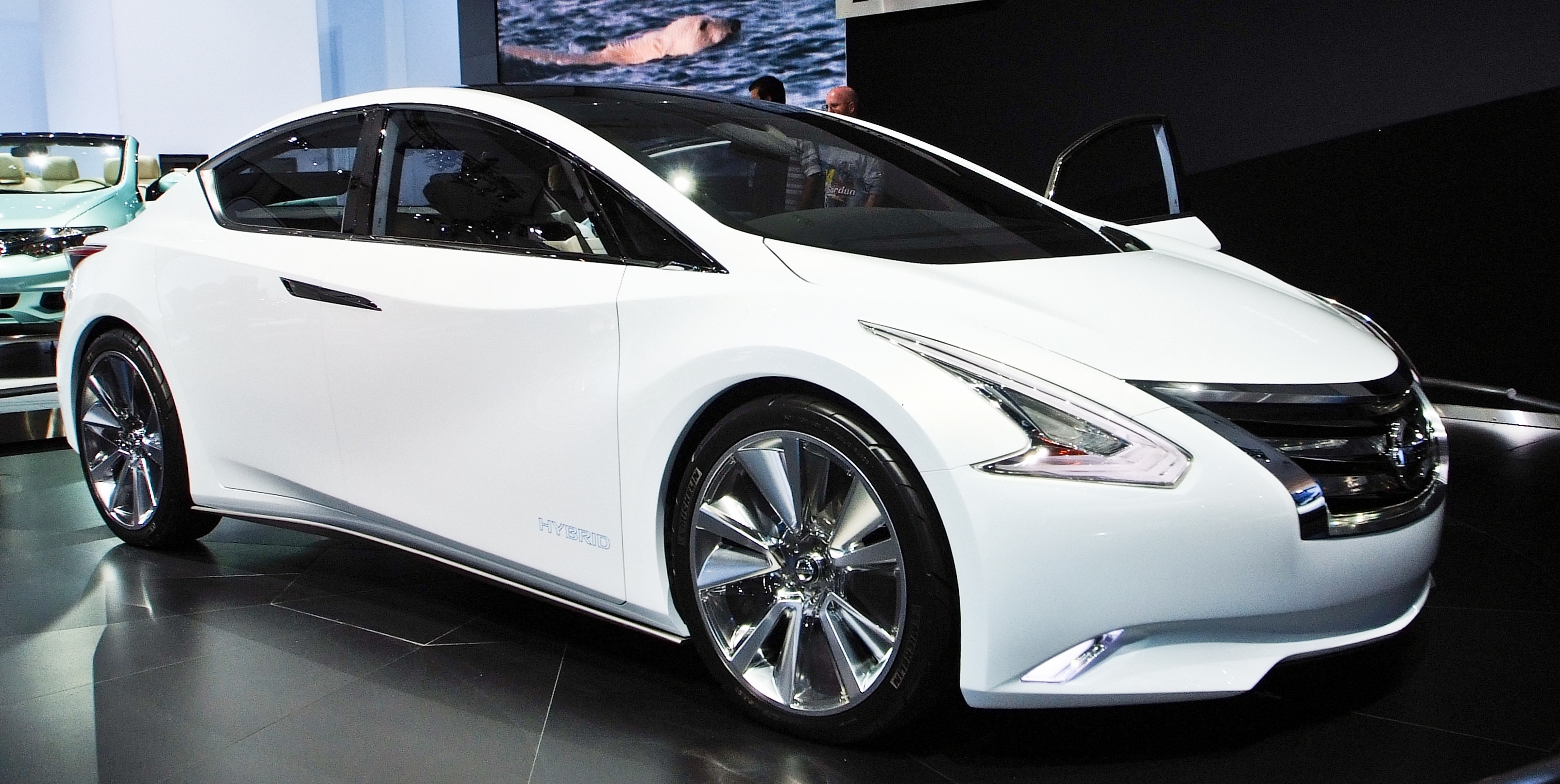 Nissan Ellure Concept